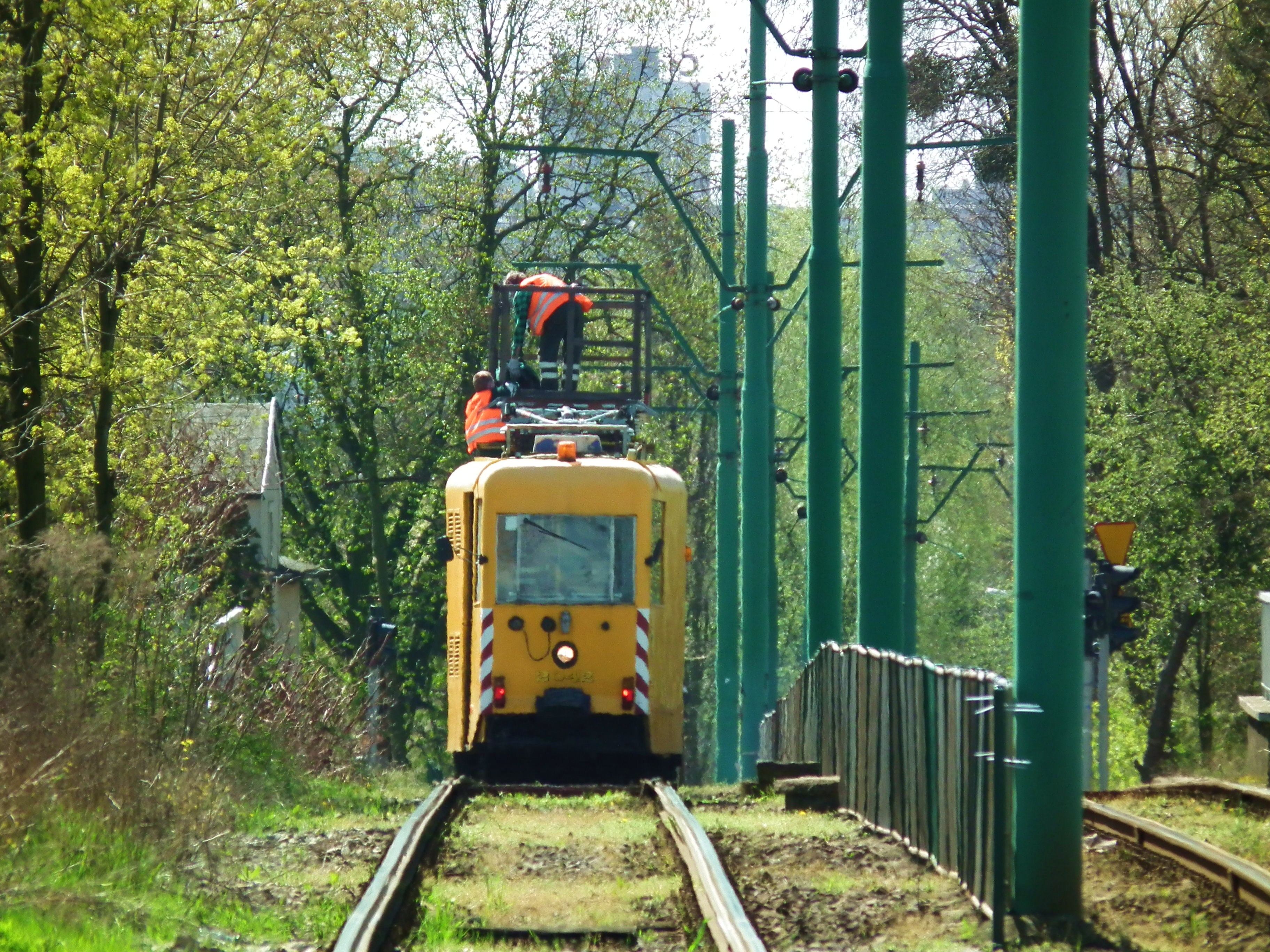 Remont trasy tramwajowej Piątkowska w Poznaniu. Kwiecień 2016 - początek robót.